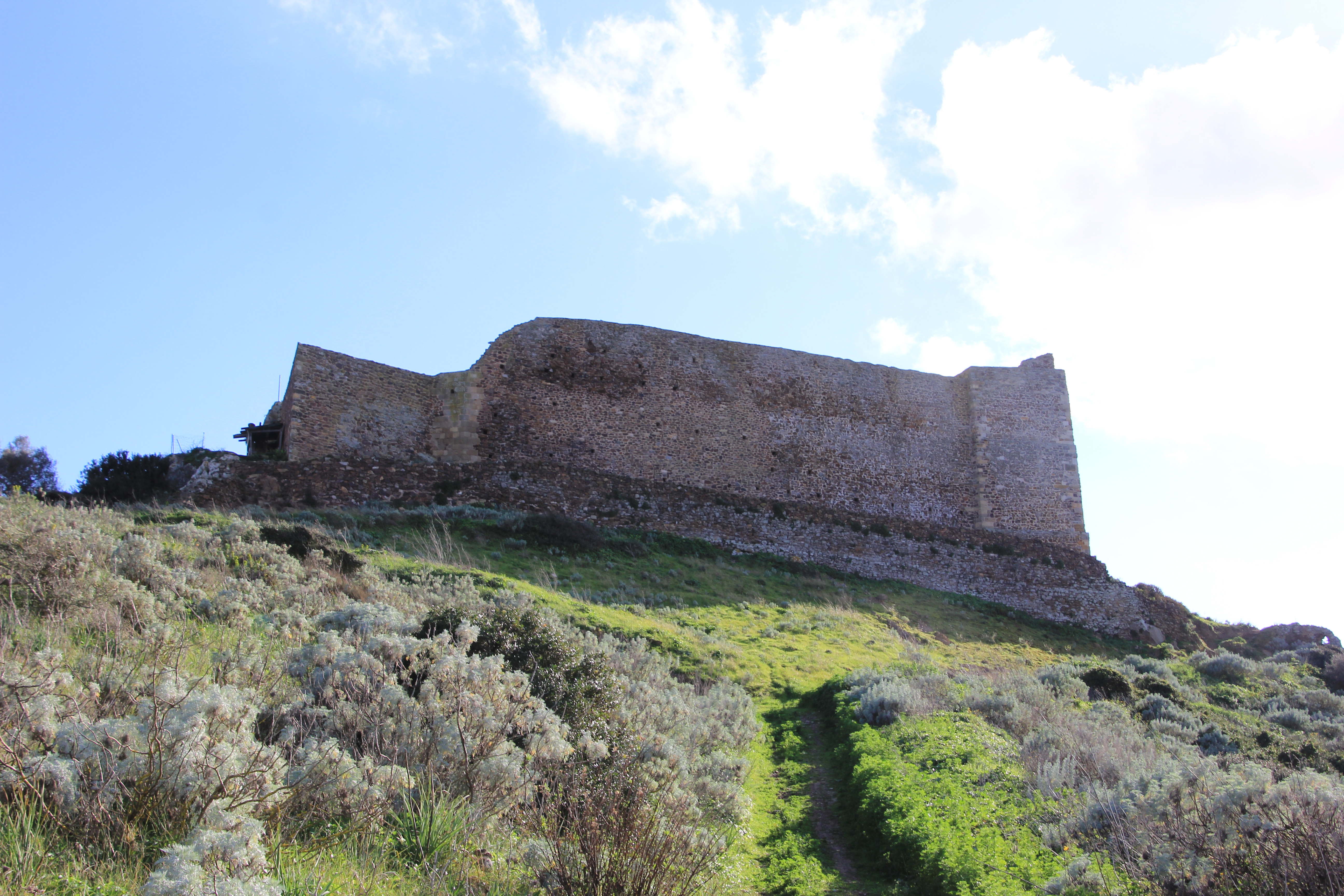 Sardara - Castello di Monreale